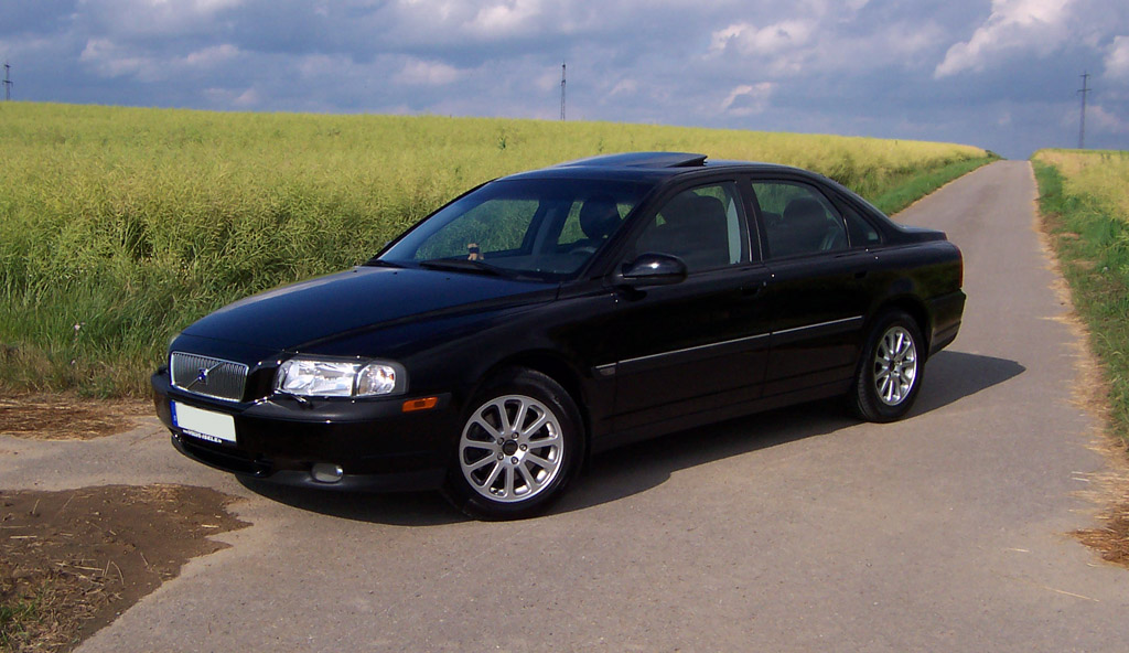 Volvo S80 T6 2000